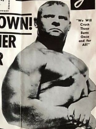 Crusher au recto du Chicago Wrestling Club Newsletter du 2 novembre 1968.